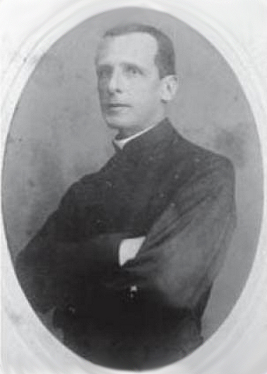 Roberto Landell de Moura